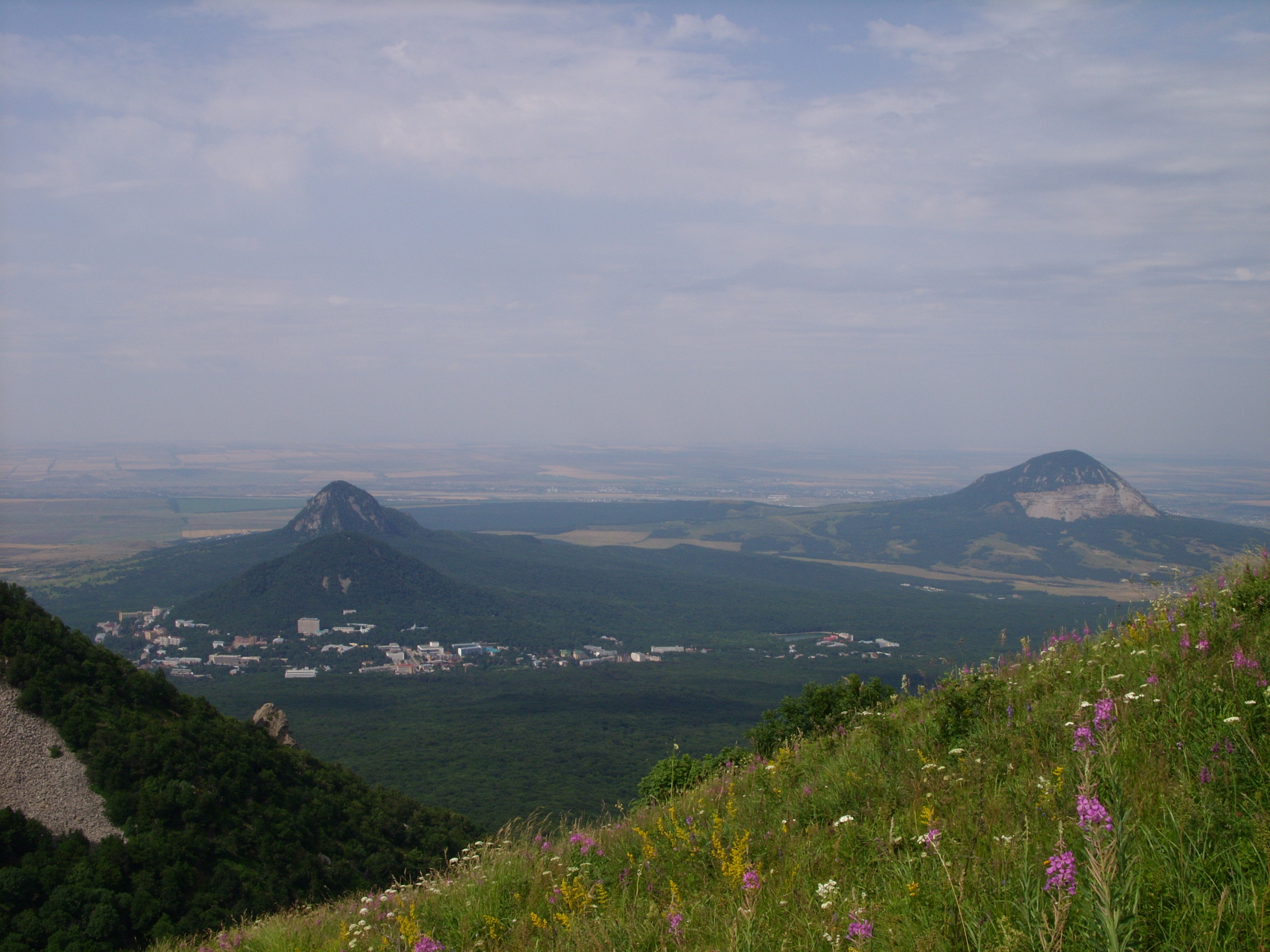 снимок июля 2009 г.